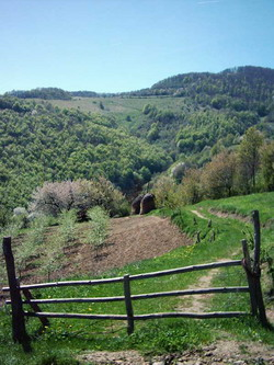 Countryside in Ljubičevac, near Stragari (Serbia)/La campagne autour de Ljubičevac, près de Stragari, Serbie